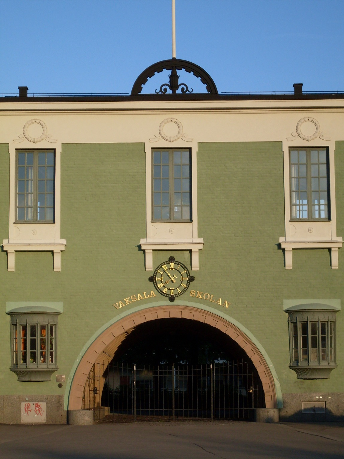 Vaksalaskolan, Uppsala. Fasad mot Vaksala torg, mittpartiet.